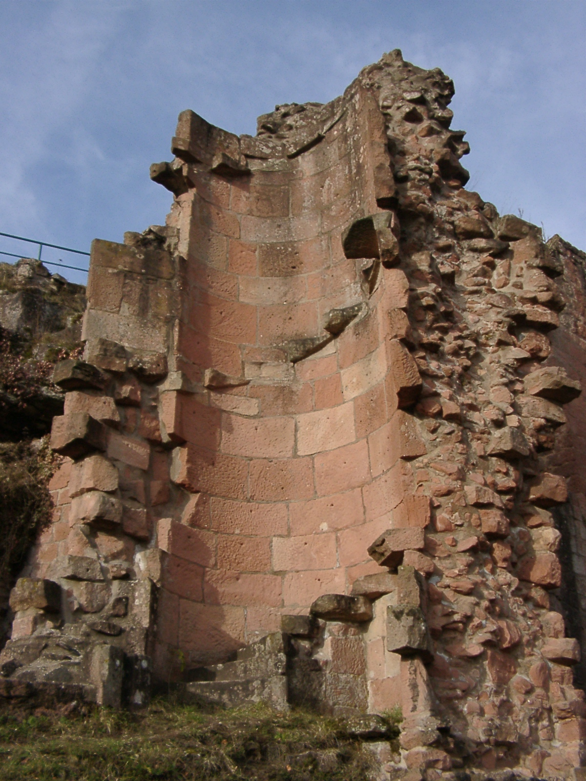 Burg Neidenfels, Reste eines Treppenturms